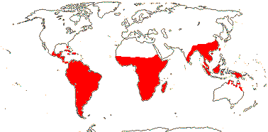 Ocorrência de Spenocleaceae no globo.